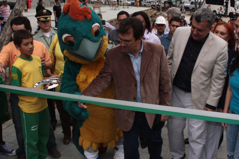 IX Juegos Suramericanos - Inauguración de escenarios - Fotografía Telemedellín